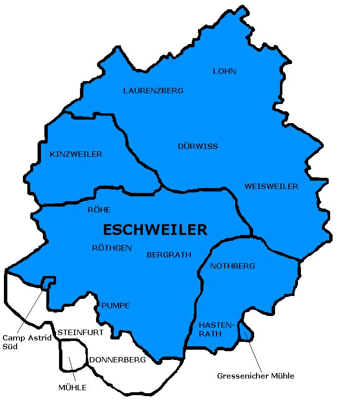 Ewentwicklung1972